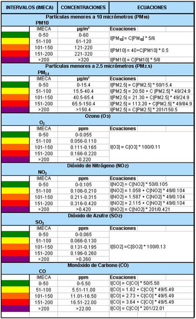 Formulas para calcular el IMECA por contaminante